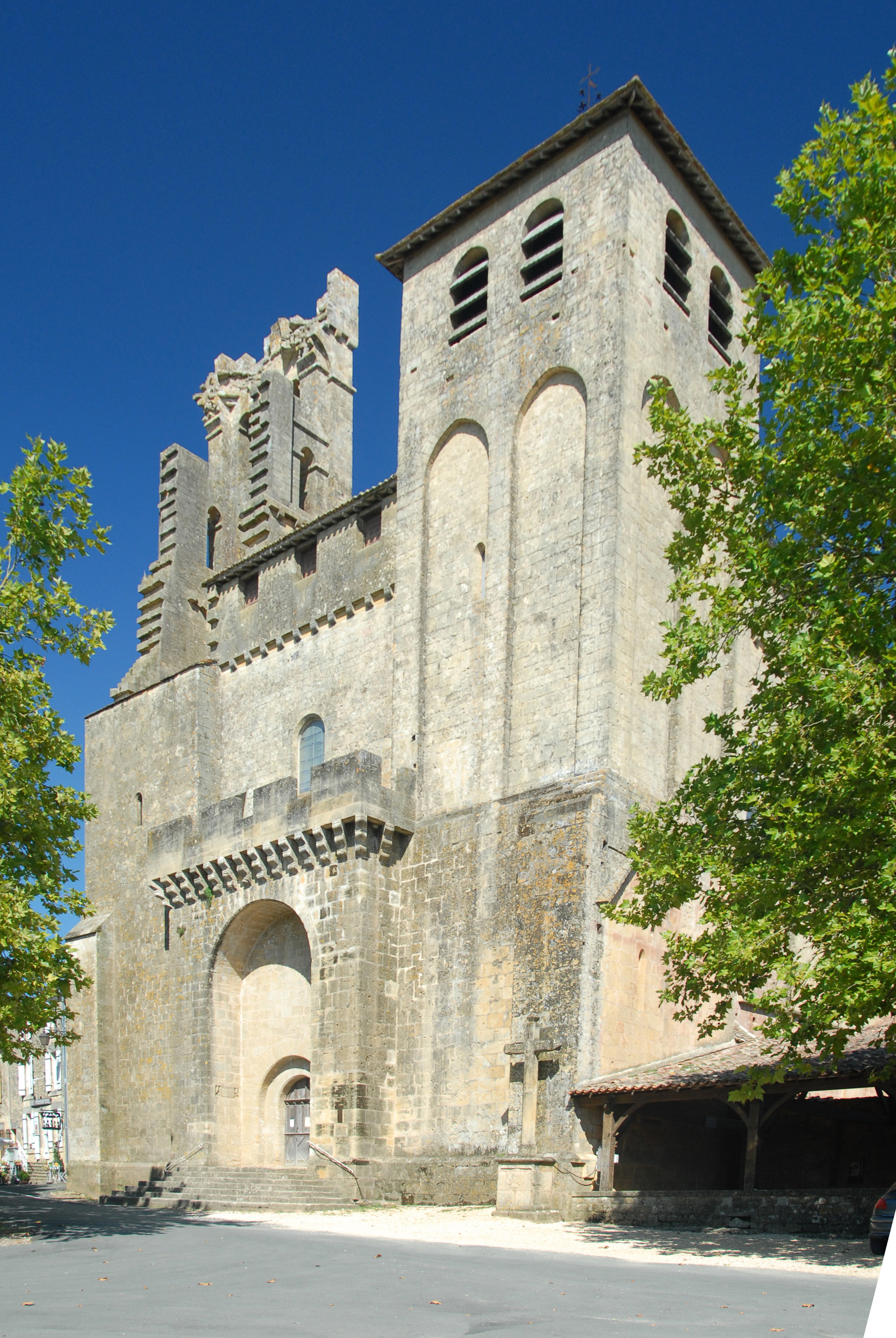 St.-Avit-Sénieur, Westwerk von SW